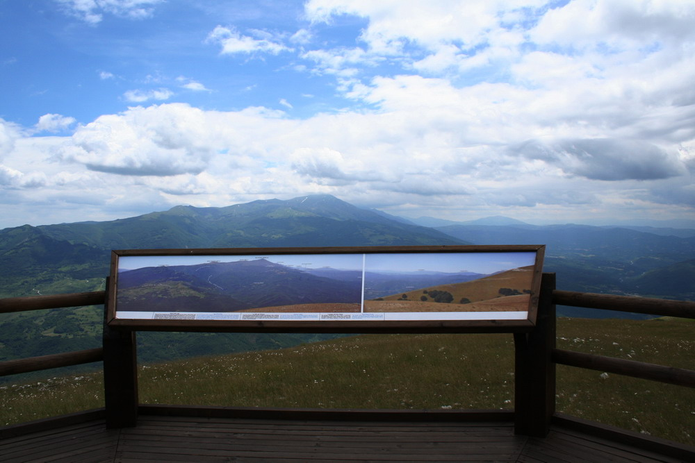 Sibilla.io, proprio scatto, panorama del belvedere, tratto finale del Sentiero per tutti, località Forca di Presta (Ascoli Piceno), esterno giorno, 17 giugno 2007,"Utilizzo concesso" This file is licensed under Creative Commons 2,5 license